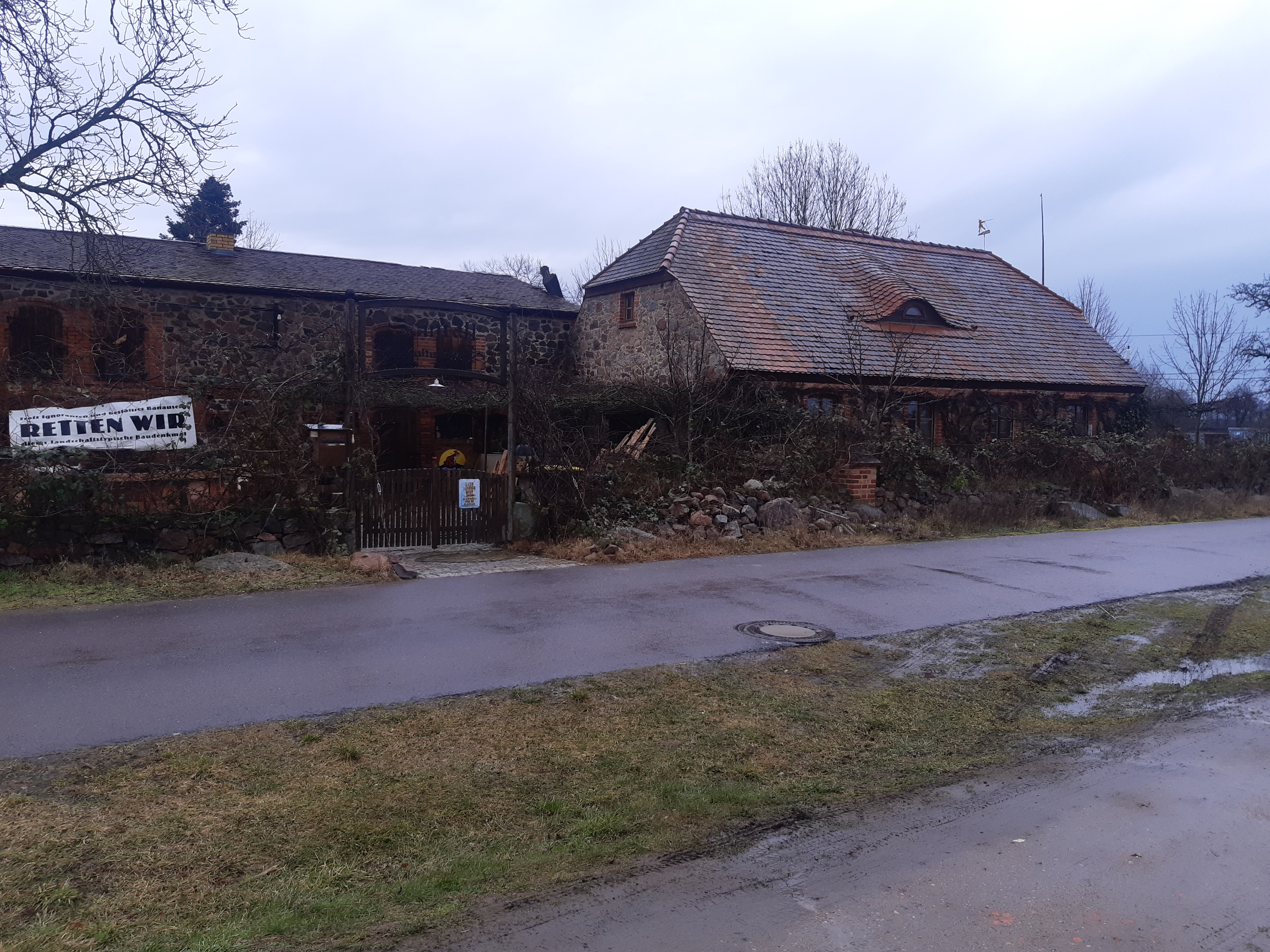 Häusergruppe